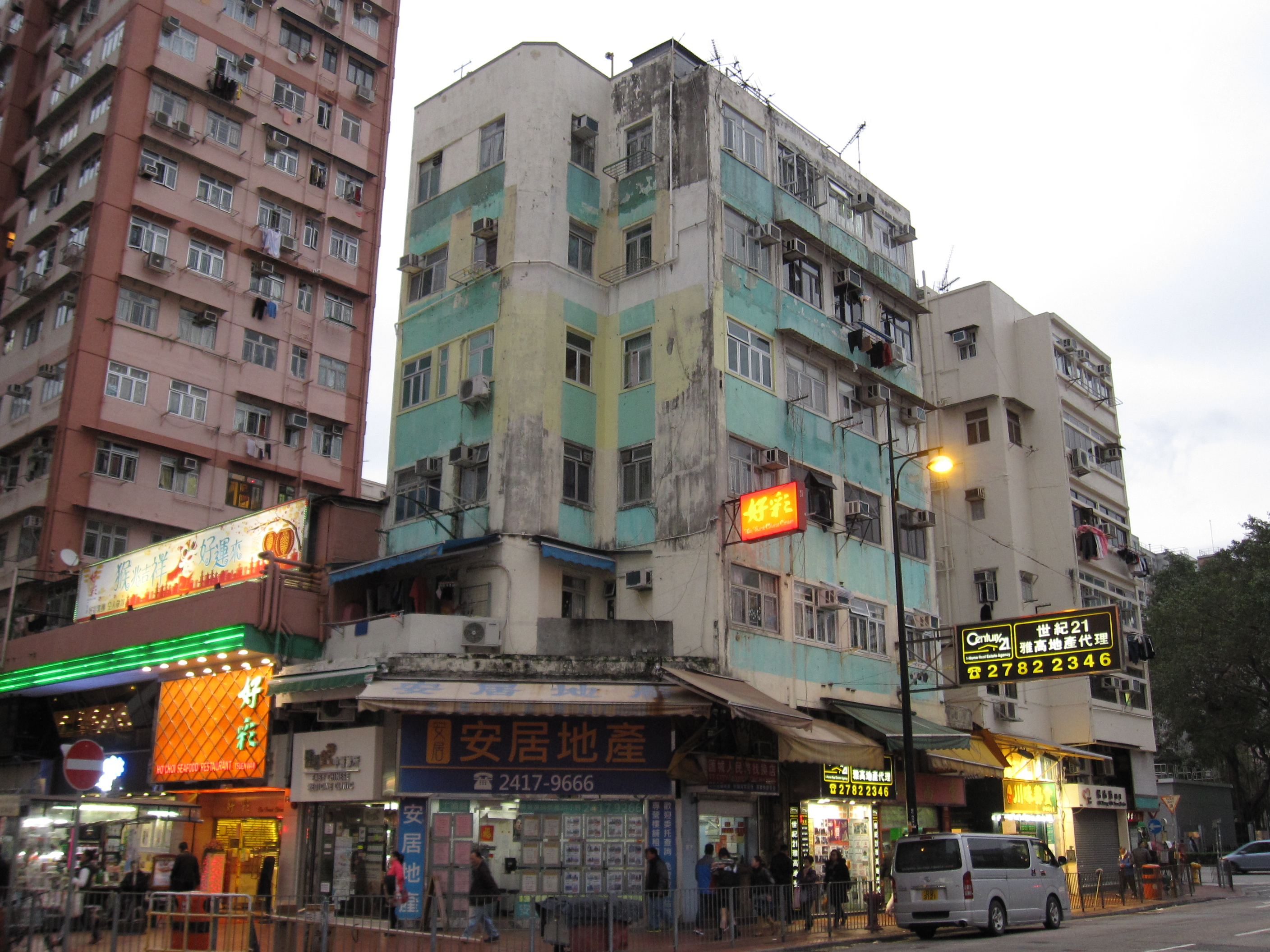 中文（香港）: 德仁樓第十一期。